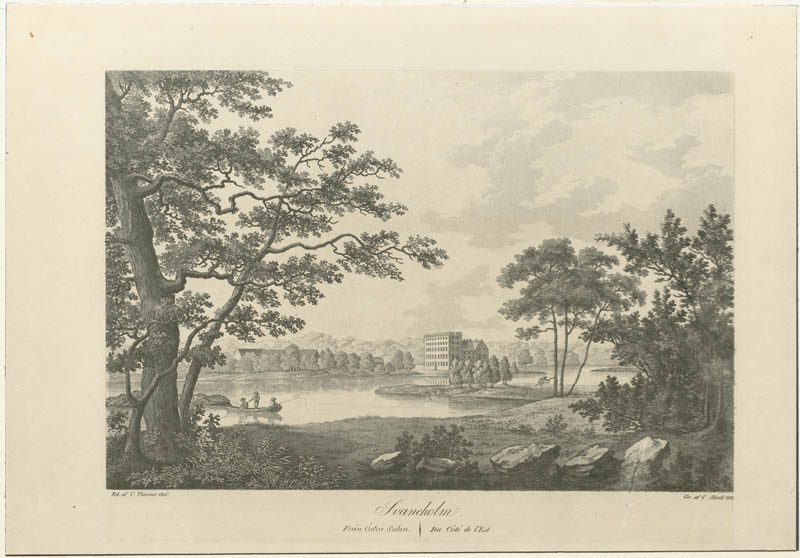 Raä-nr: Skurup 2:1. Aquatint av Ulrik Thersner 1816, återgiven i verket "Fordna och närvarande Sverige" 1818. Motiv: Skurup 2:1 Kategori: Slott, Aquatint Raä-nr: Skurup 2:1. Aquatint av Ulrik Thersner 1816, återgiven i verket "Fordna och närvarande Sverige" 1818. Skurup 2:1.